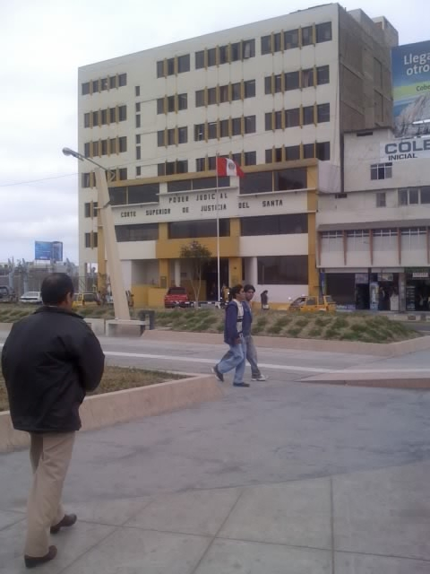 Corte Superior de Justicia del Santa en Chimbote, Perú